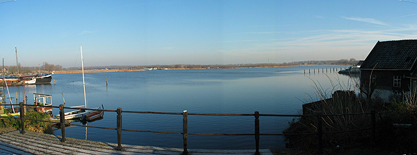 Panorama van Het IJ bij Spaarndam. 17 januari 2005, foto van Gerard Hogervorst